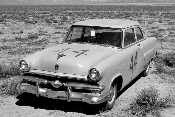 1953 Ford Mainline Tudor Sedan. March 17, 1953- USAF, UPSHOT-KNOTHOLE